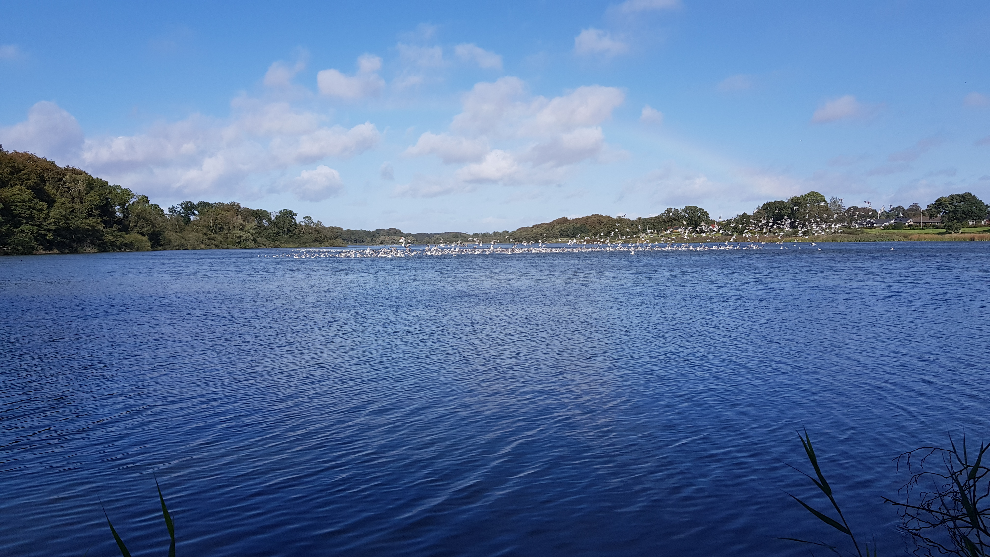 Udsigt over Søgård Sø fra den sydlige ende. En stor flok måger lettede netop som fotografen stak hovedet frem mellem sivene